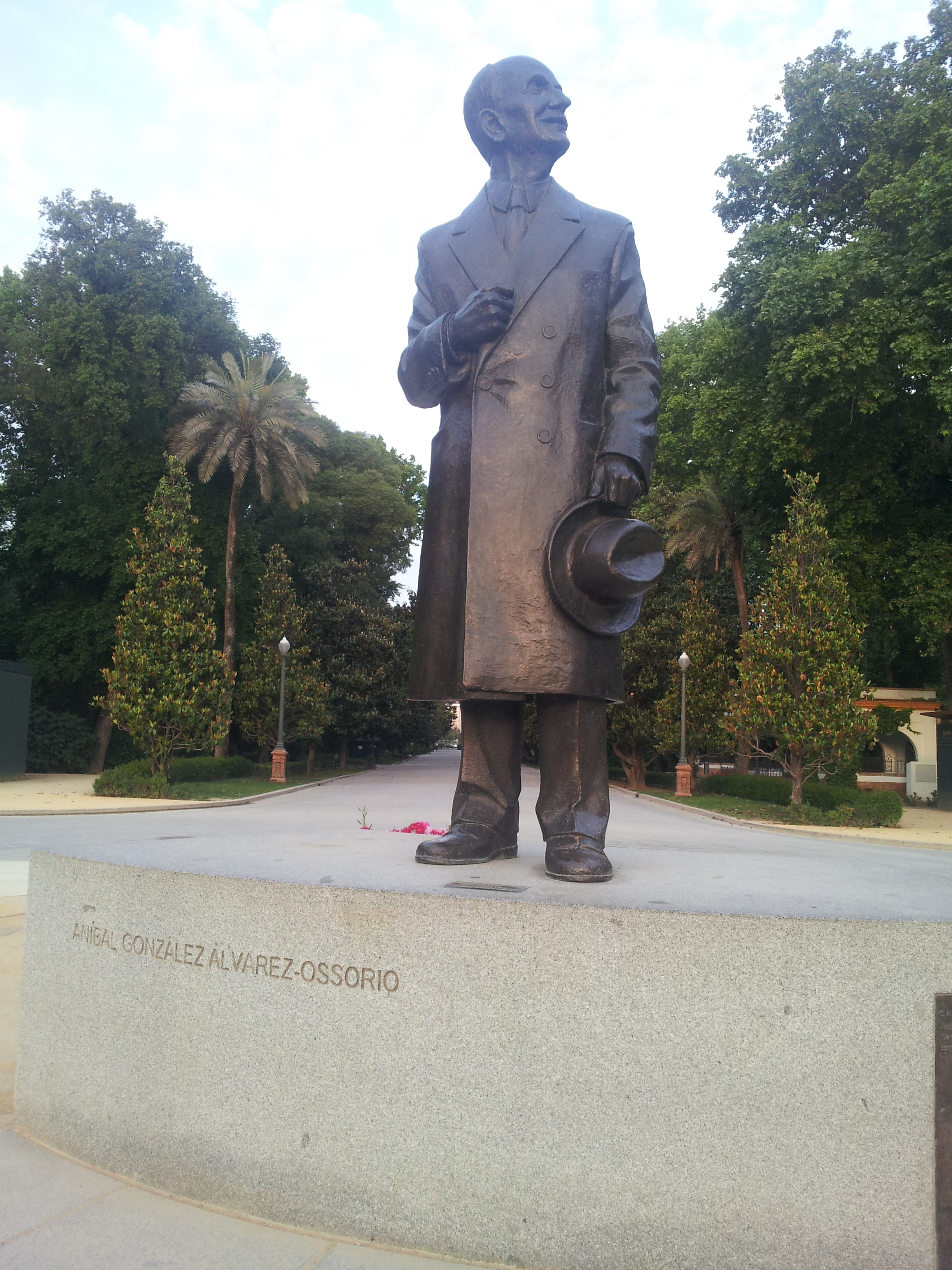 Escultura de Ánibal Gonzales, situada en la entrada de la Plaza de España de Sevilla.